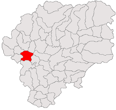 Categorie:Hărţi ale judeţului Bistriţa-Năsăud